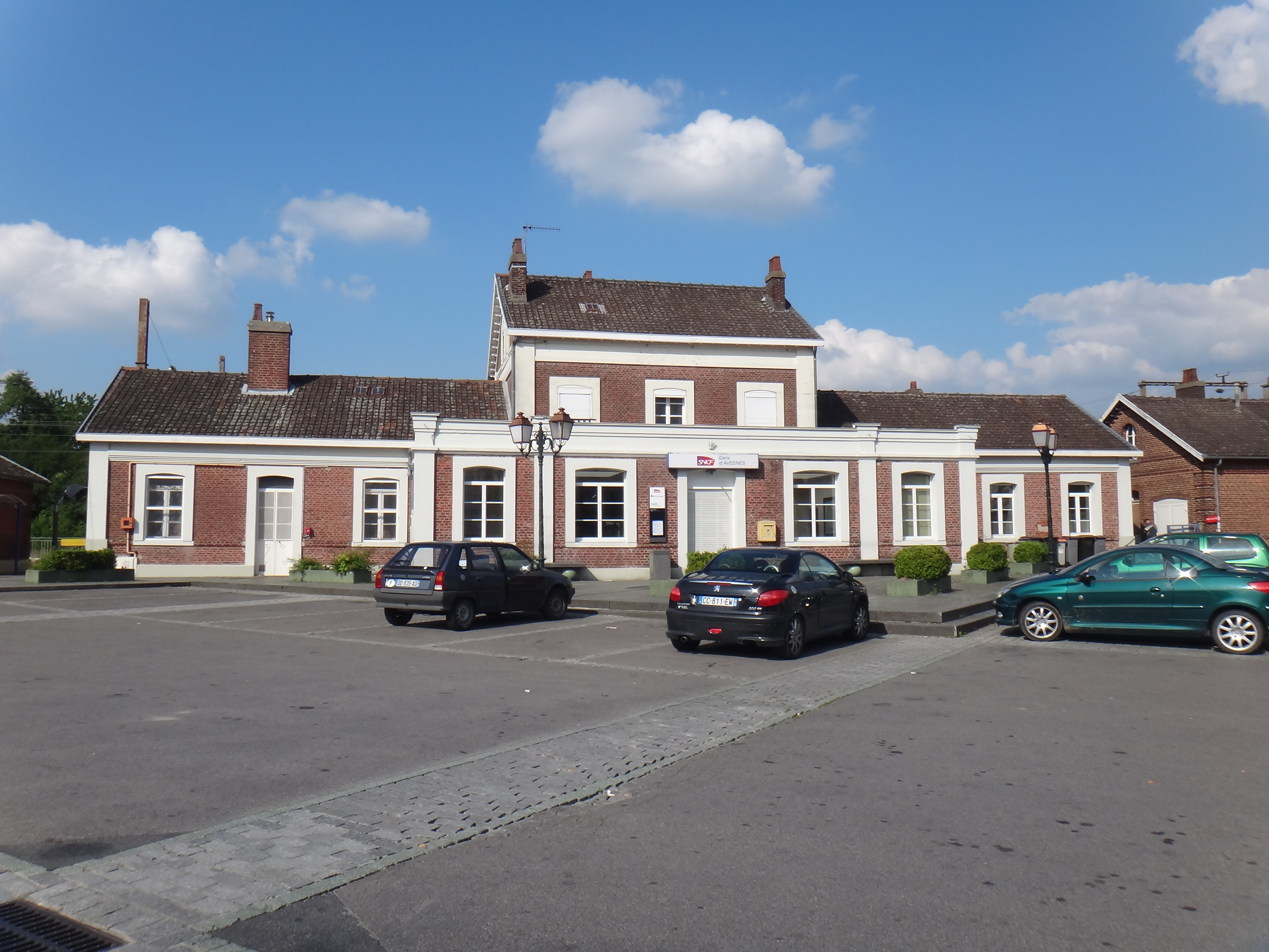 Gare de AVESNES ,ANORD, France, en 2014